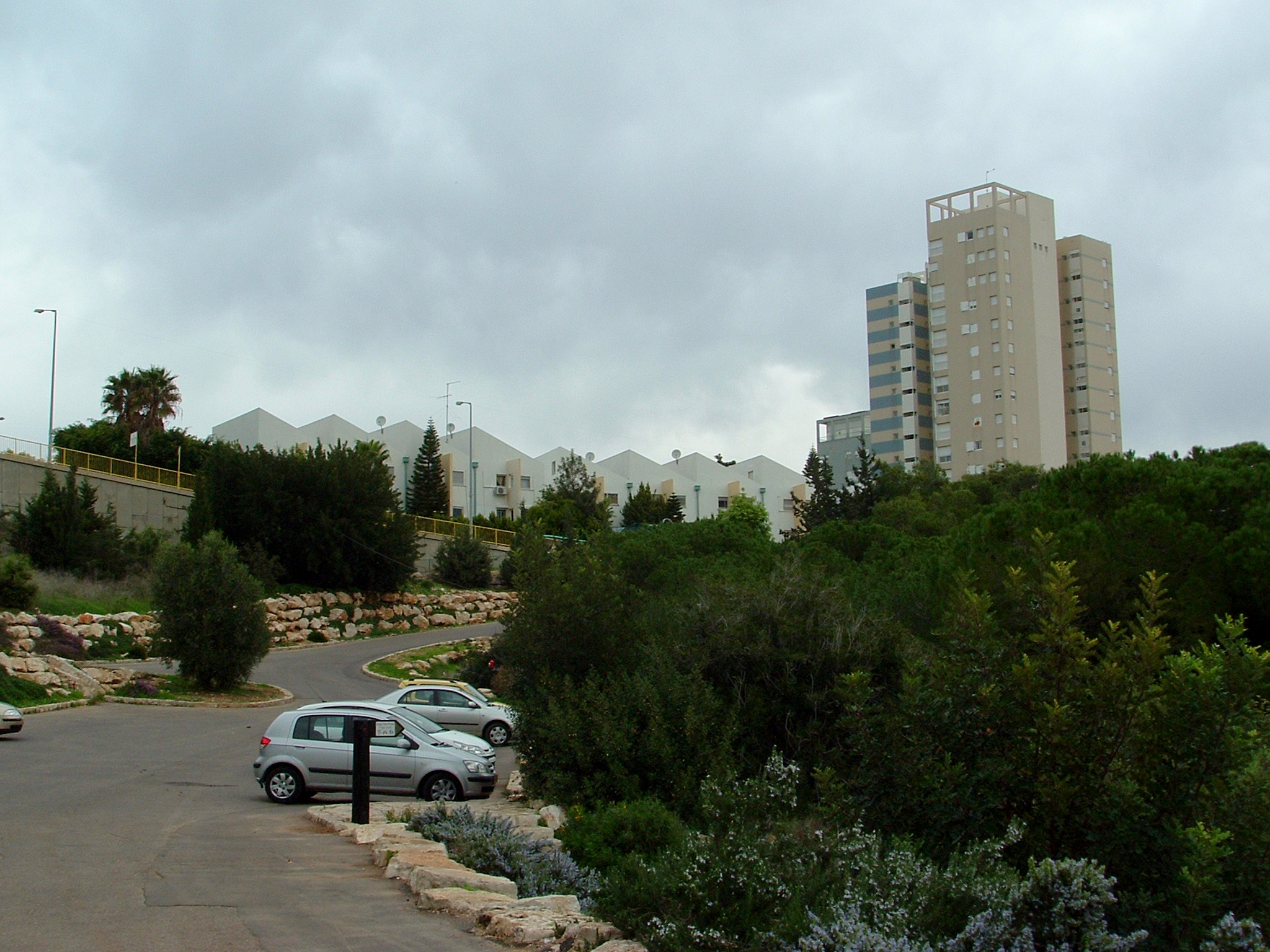 Nesher View in Town Nesher - Israel מראה של רחוב בעיר נשר שכונת רמות יצחק מפארק נשר